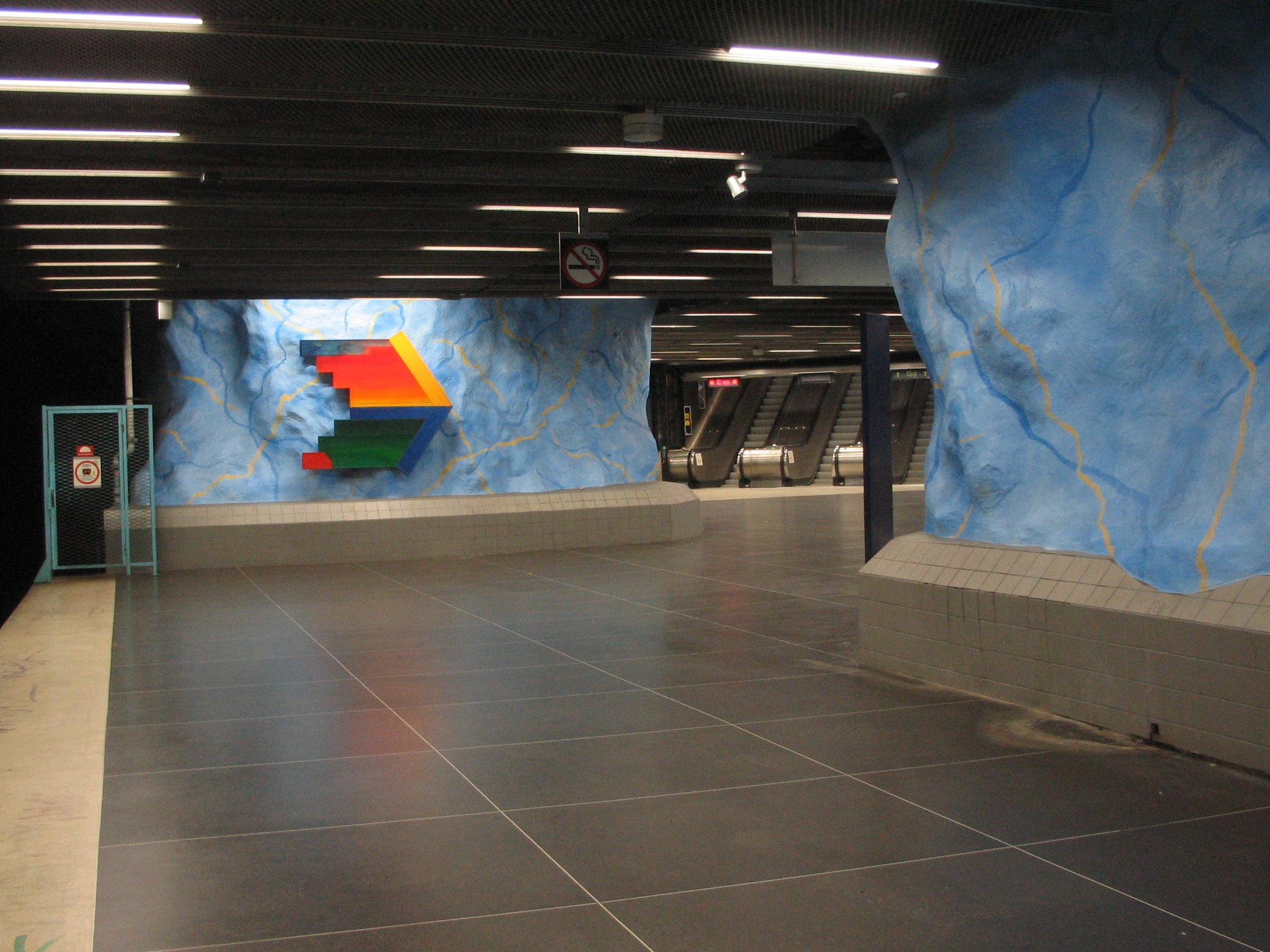 Stadion, a metro station in Stockholm, Sweden.